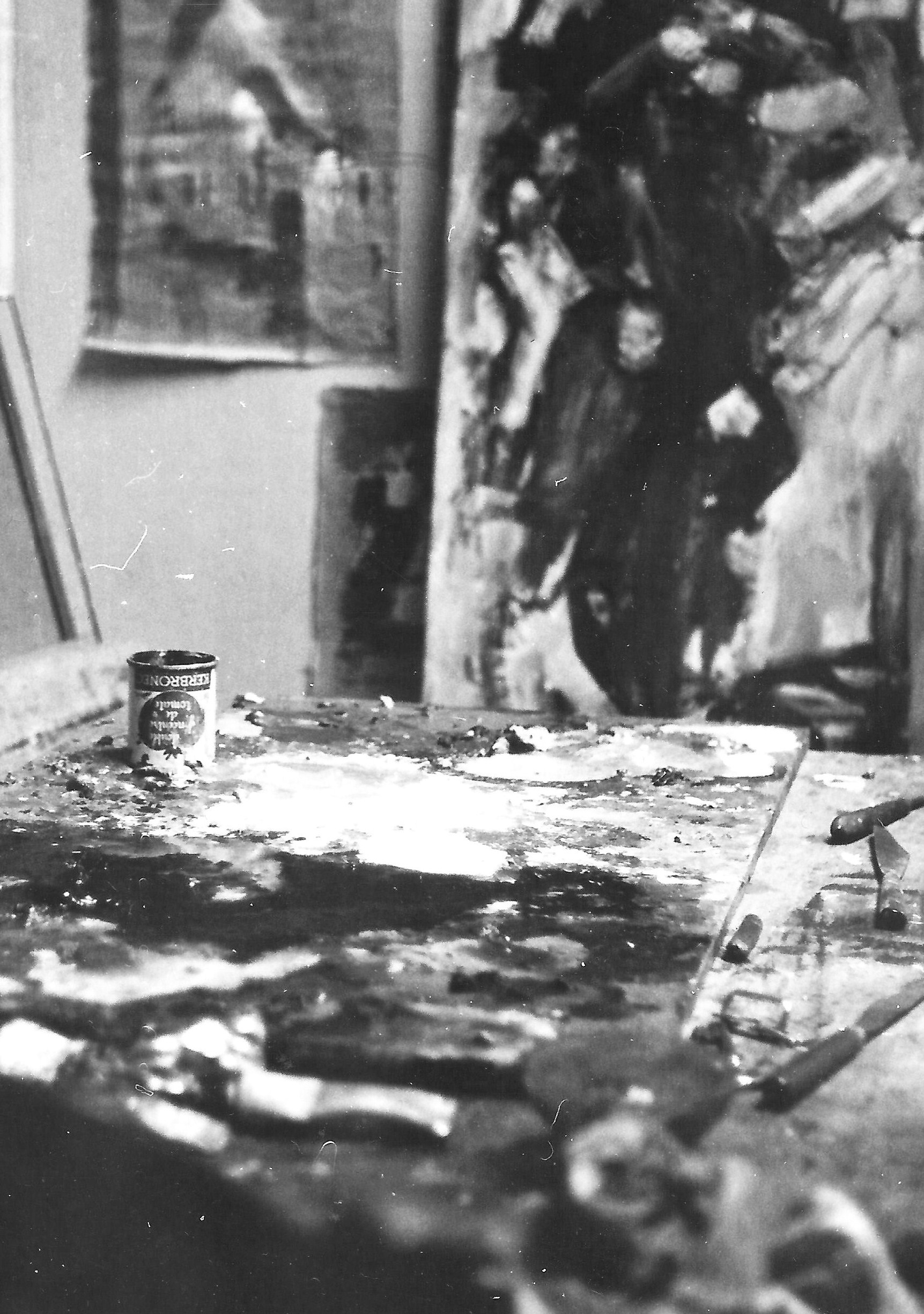 Atelier du peintre-graveur français Marcel Fiorini, vers 1966